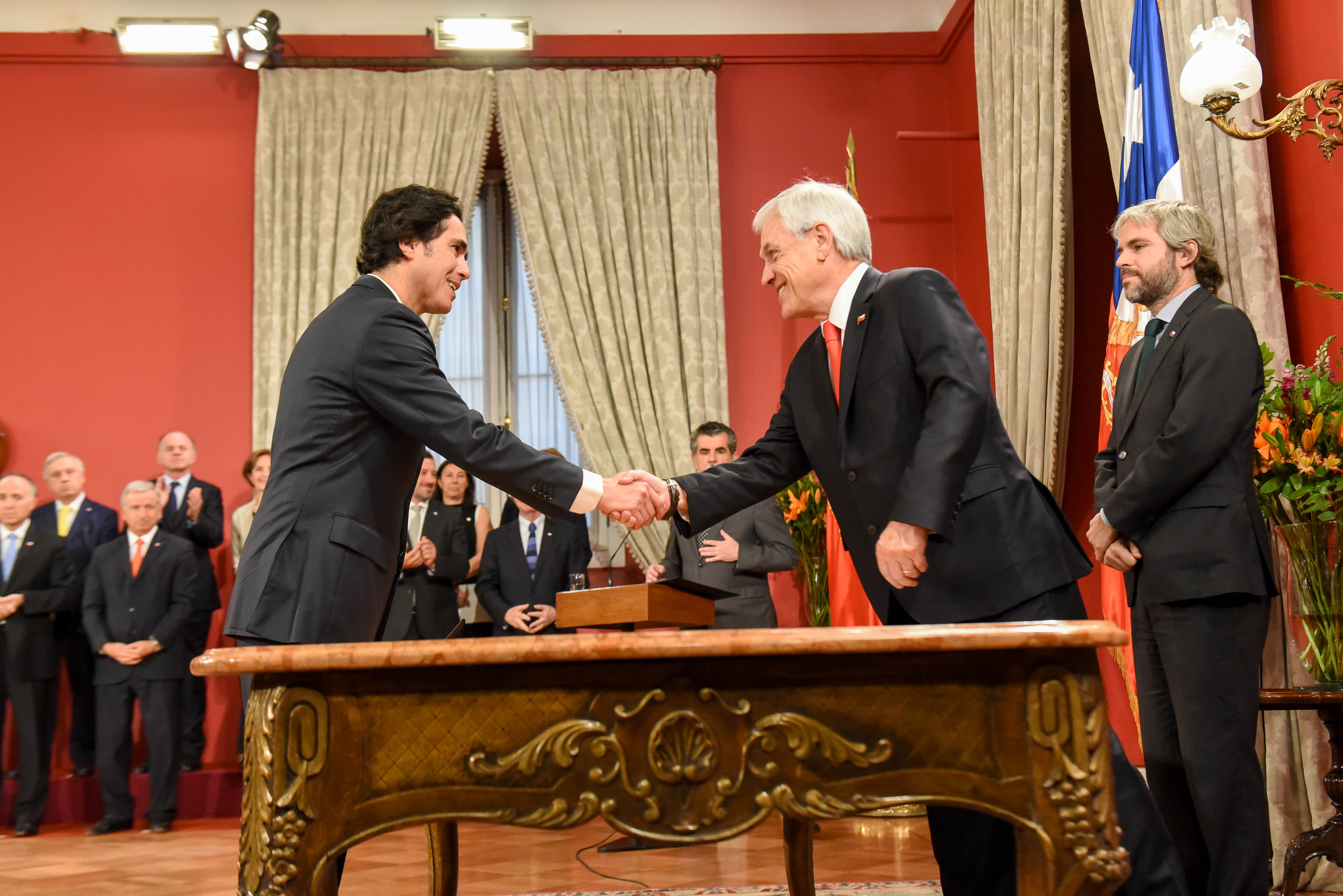 Cambio de Gabinete del presidente Sebastián Piñera en octubre de 2019